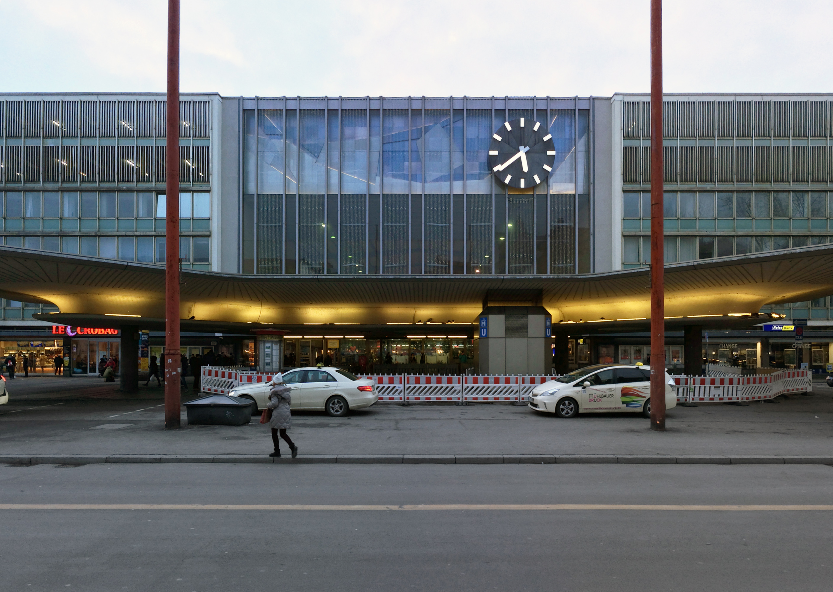 Hauptbahnhof München, 1955–1963, Franz Hart und Heinrich Gerbl, Vordach aus Beton genannt „Schwammerl“, Abriss geplant (für 2018?). Plattenmosaik 1951 von Rupprecht Geiger